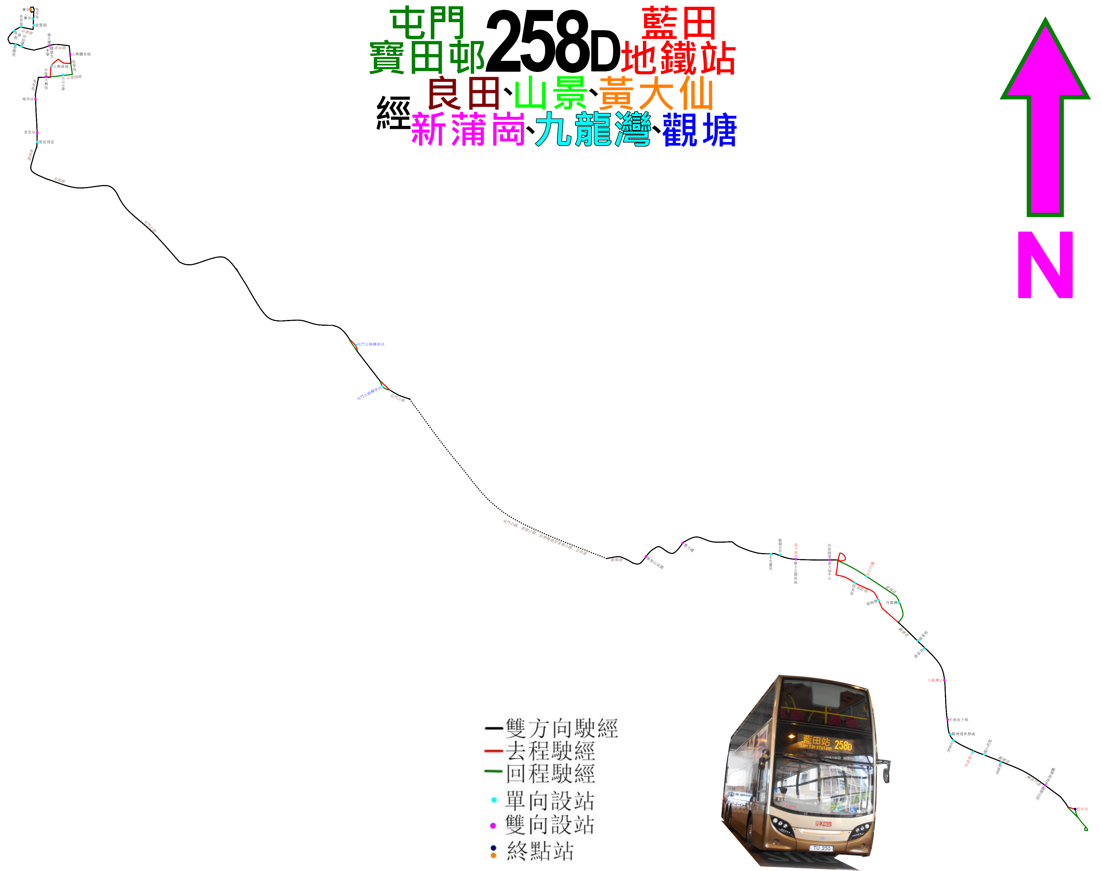 中文（香港）: 九巴258D線的走線圖